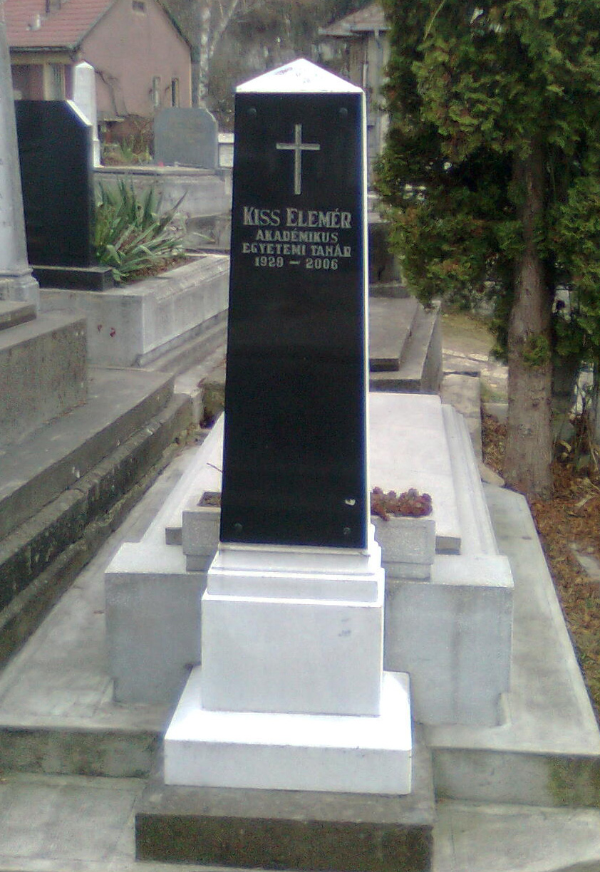 Kiss Elemér matemikus sírja a marosvásárhelyi római katolikus temetőben